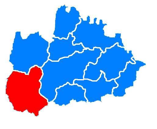 Andrychów